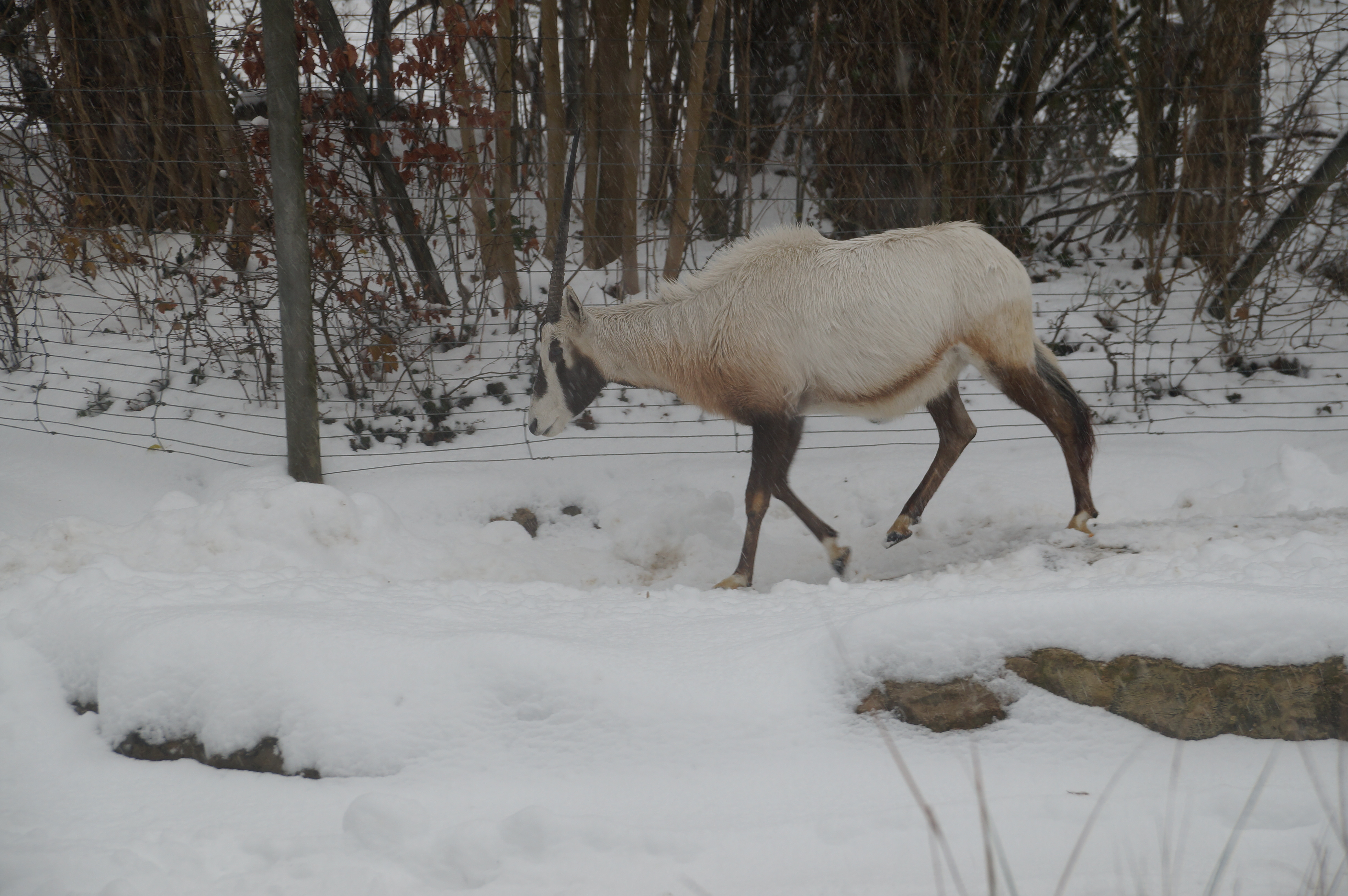 Zoo Zürich Arabische Oryx